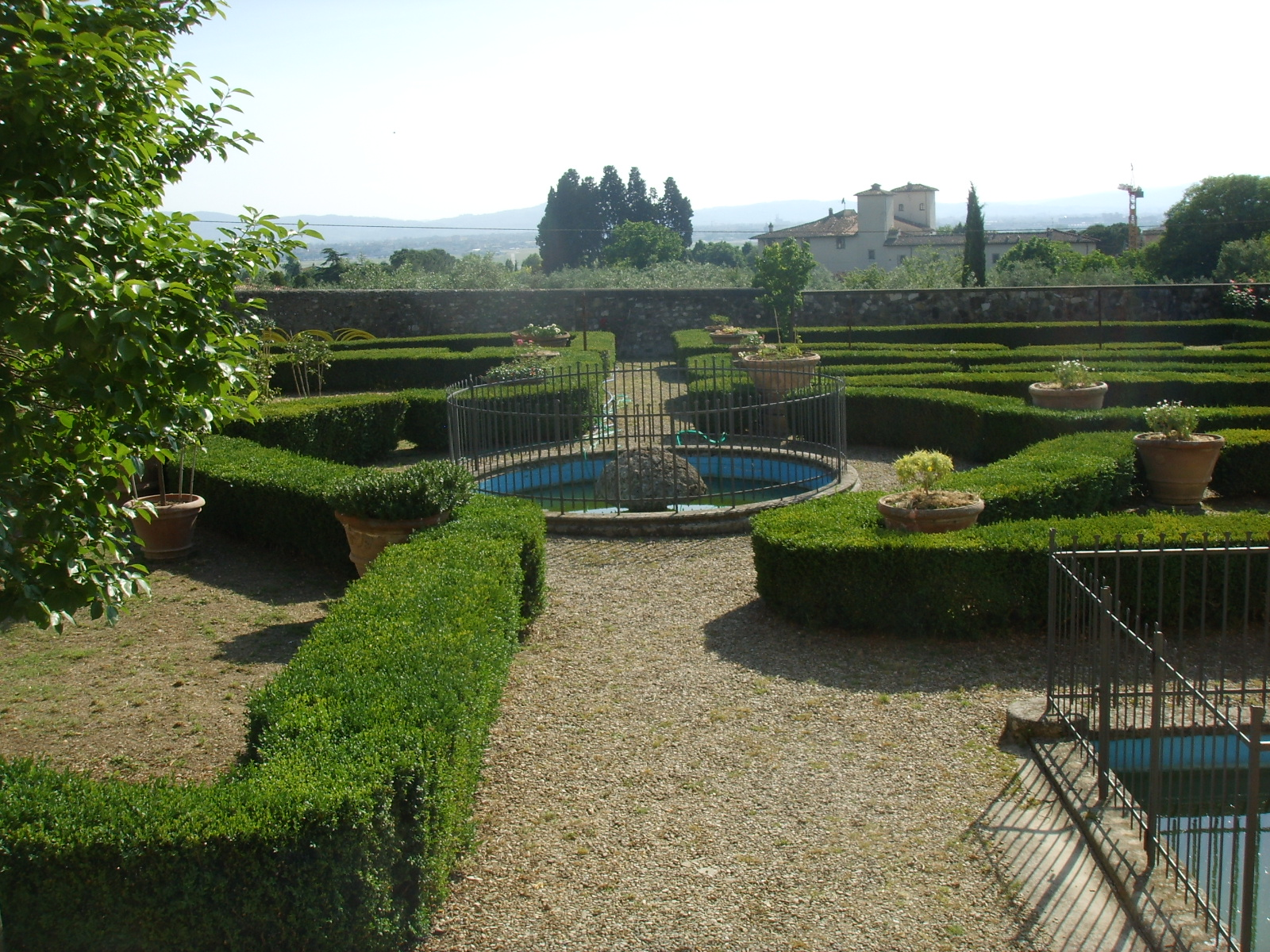 Italian Renaissance gardens of Villa il Pozzino.